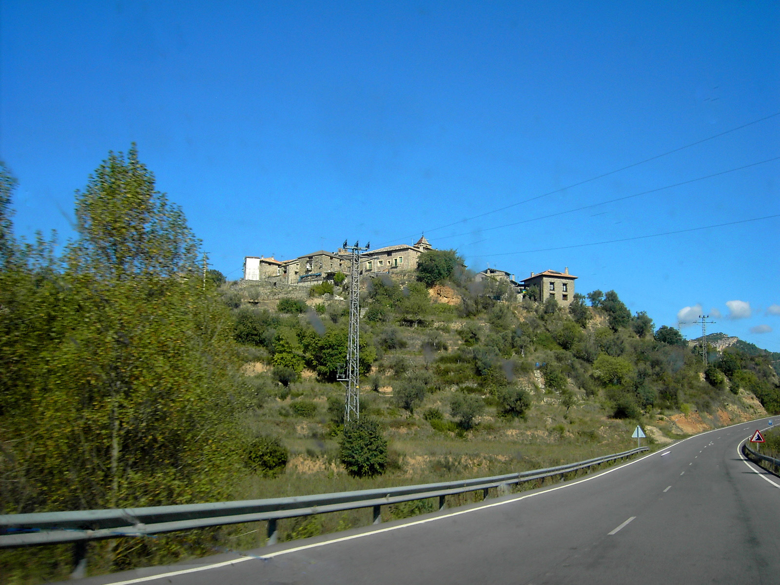 Vista de Escanilla, tal y como se ve desde le carretera A-138.